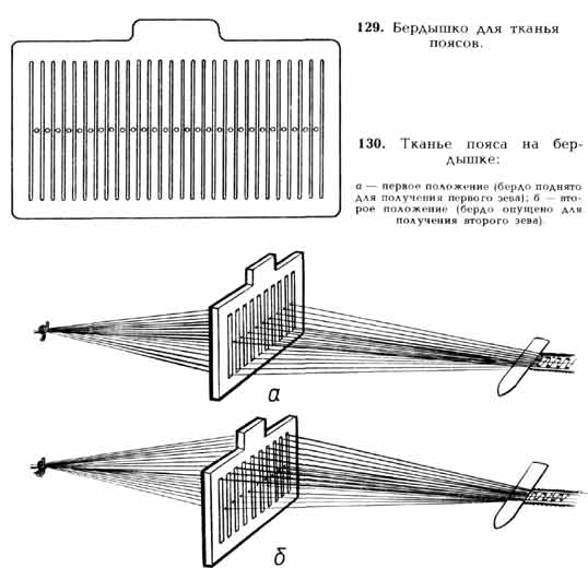 Бердо и принцип его работы